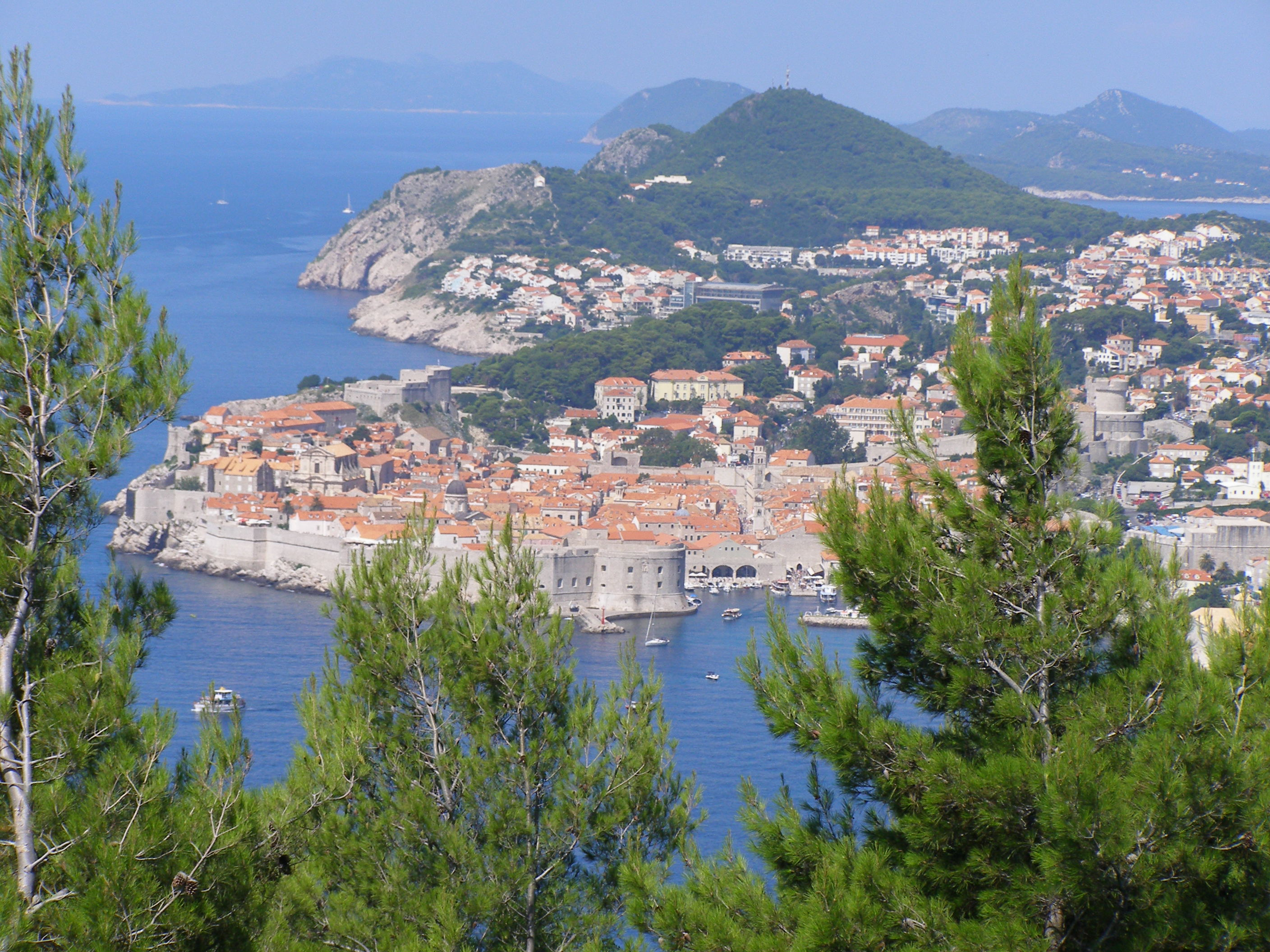 Altstadt Dubrovnik und Vororte, im Vordergrund die Altstadt mit der Stadtmauer umgeben